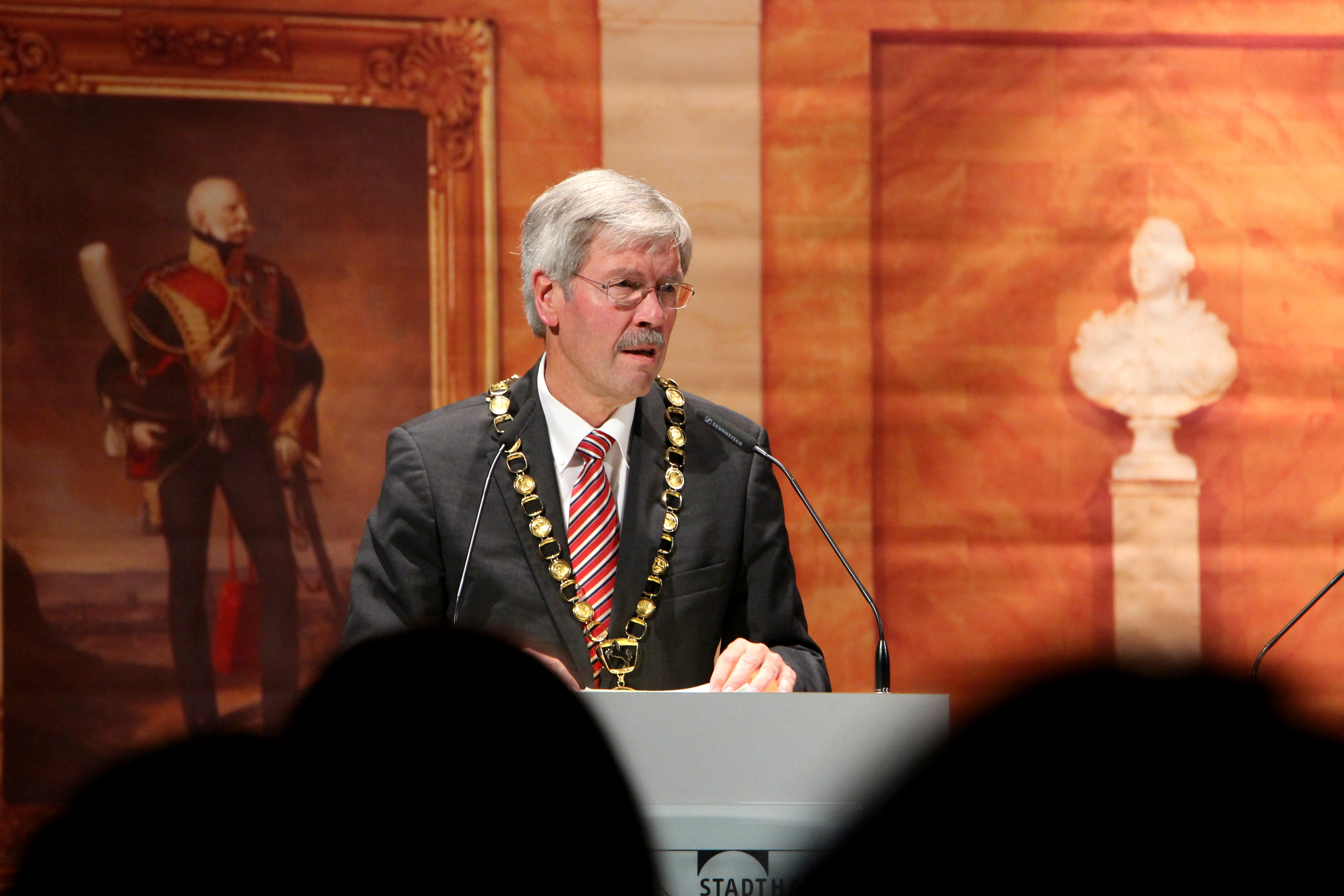 Mayor of Göttingen, Wolfgang Meyer (SPD), holding a speech at Historikertag 2014 in Göttingen.